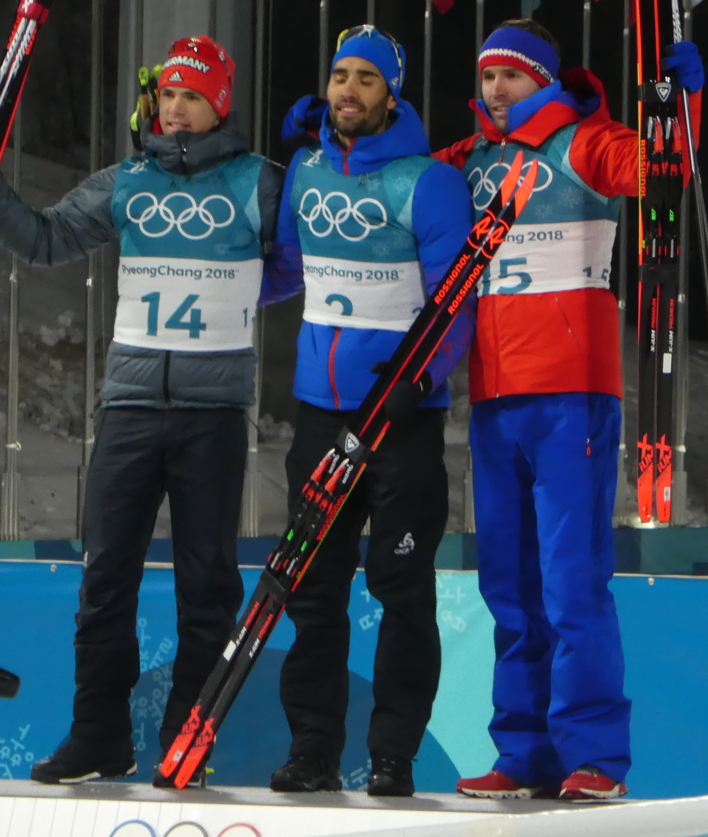 Alpensia, centre du biathlon 3 médaillés: Martin Fourcade, Simon Schempp et Emil Hegle Svendsen